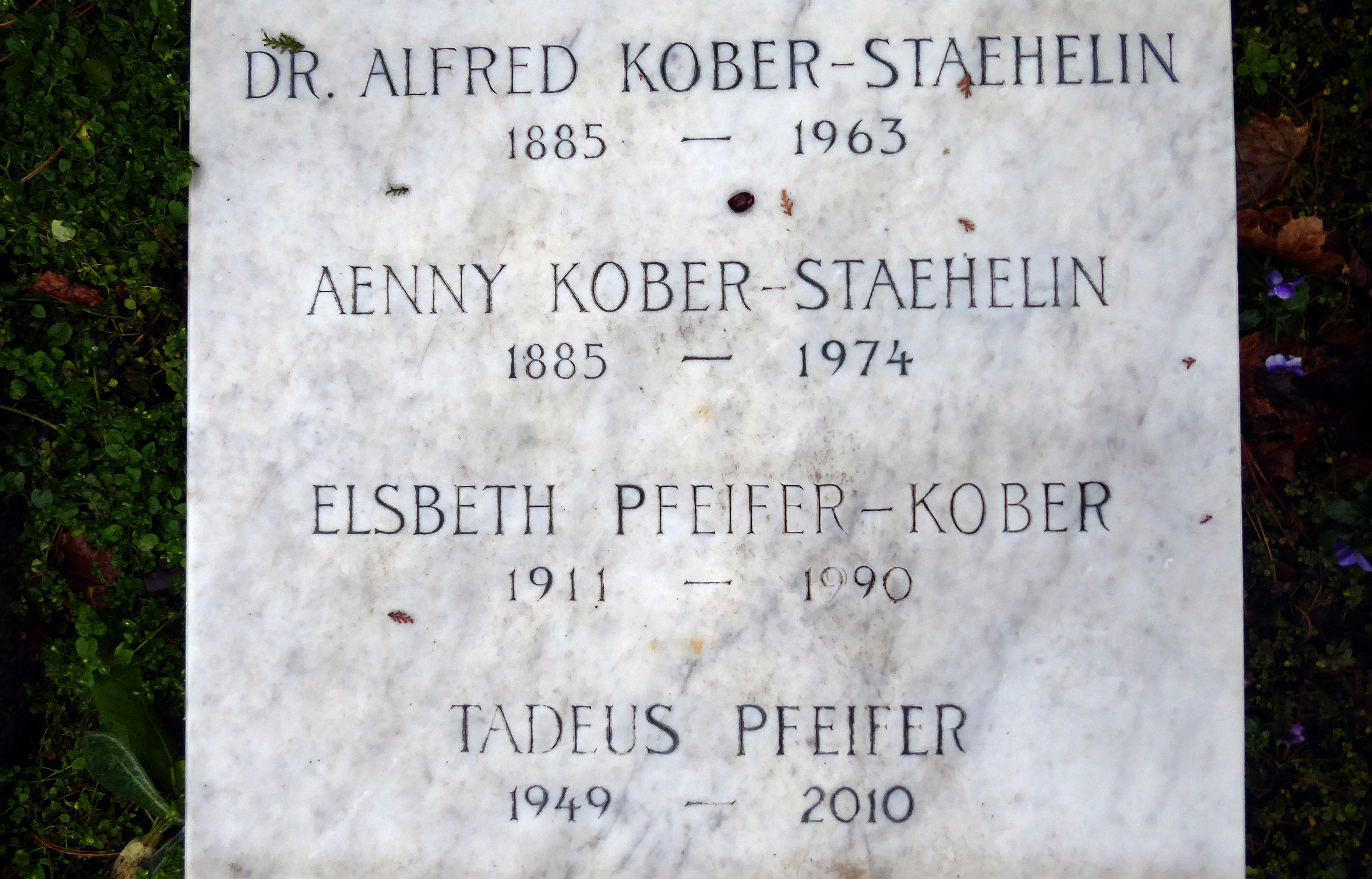 Tadeus Pfeifer (1949–2010) Korrektor, Privatlehrer, Werbetexter Schriftsteller, Dramatiker, Autor, Herausgeber der Literaturzeitschrift «Poesie». Mietglied der «Gruppe Olten». Wolfgottesacker, Basel